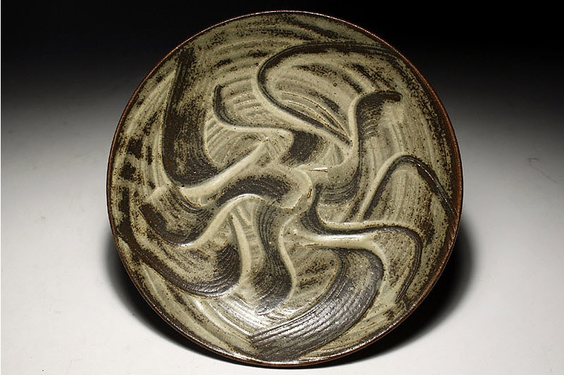 島岡達三作 象嵌刷毛目皿